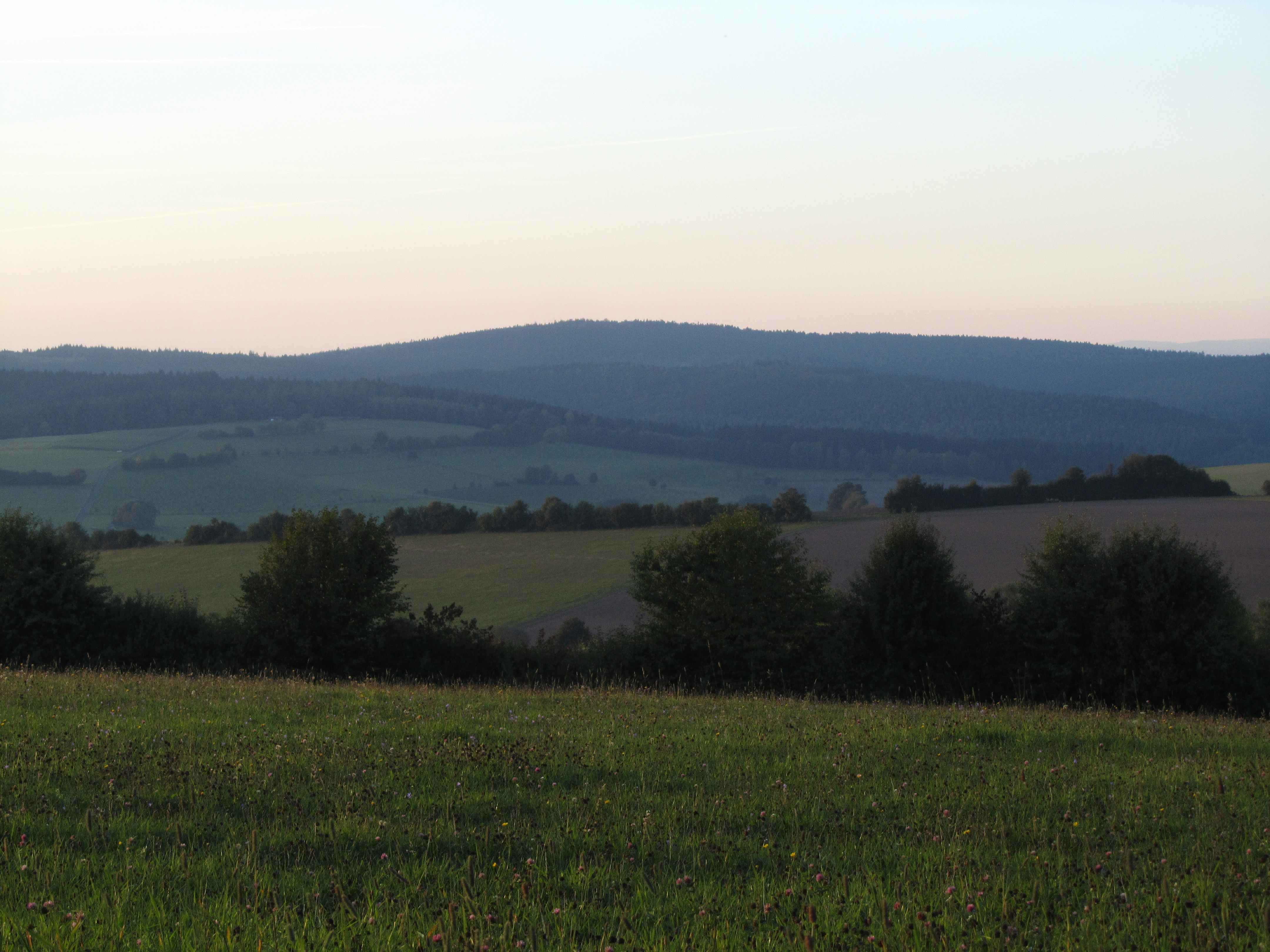 Der Markberg im Spessart von Südosten